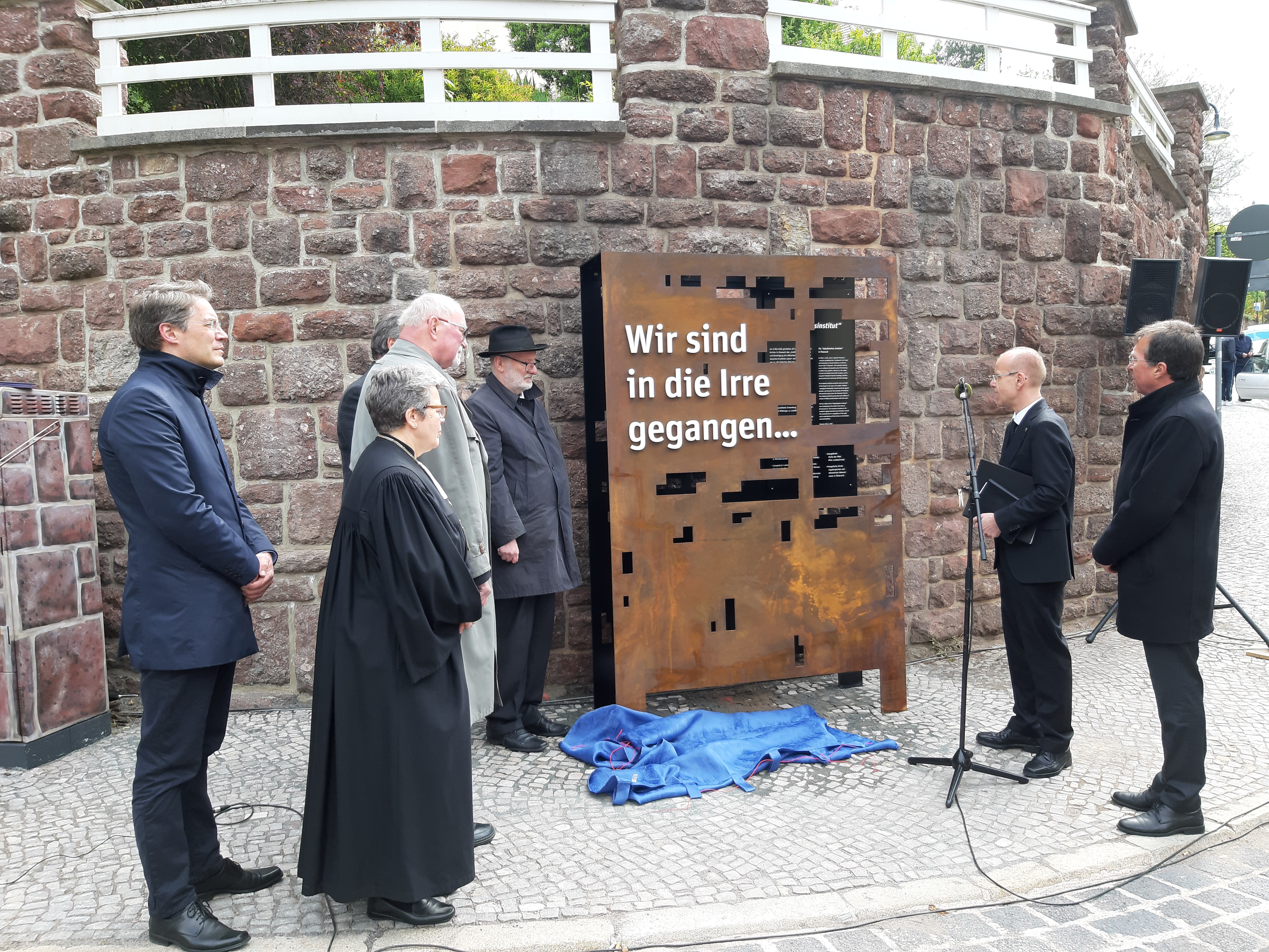 Enthüllung des Mahnmals am 6. Mai 2019 (v.l.n.r.: Initiator des Mahnmals und Kurator des Eisenacher Lutherhauses, Dr. Jochen Birkenmeier; Landesbischöfin der Evangelischen Kirche in Mitteldeutschland, Ilse Junkermann; Präses der Evangelischen Kirche in Hessen-Nassau, Dr. Ulrich Oelschläger; Kirchenpräsident der Evangelischen Landeskirche Anhalts, Joachim Liebig [verdeckt]; Karl W. Schwarz, Vertreter der Evangelischen Kirche Augsburgischen und Helvetischen Bekenntnisses in Österreich, der Dezernent für Theologische Grundsatzfragen der Evangelisch-Lutherischen Landeskirche Sachsen, Thilo Daniel, sowie Propst Thomas Drope von der Evangelisch-Lutherischen Kirche in Norddeutschland)